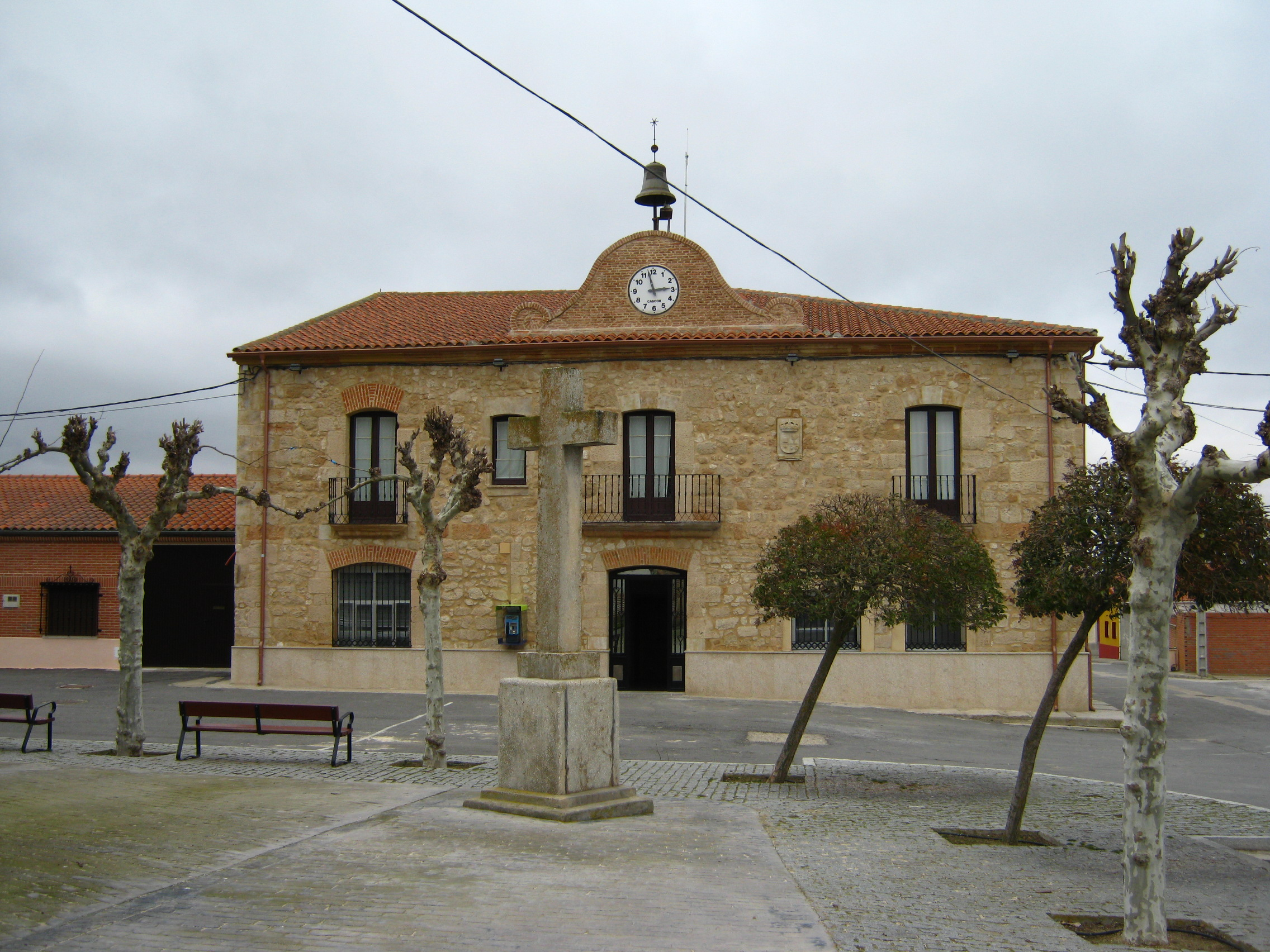 Casa consistorial de Villar de Gallimazo (Provincia de Salamanca, España)